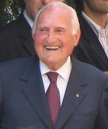 Oscar Luigi Scalfaro in un incontro con i lettori del libro La mia costituzione, affronta i punti caldi del referendum di riforma costituzionale. Ivrea, 10 giugno 2006.